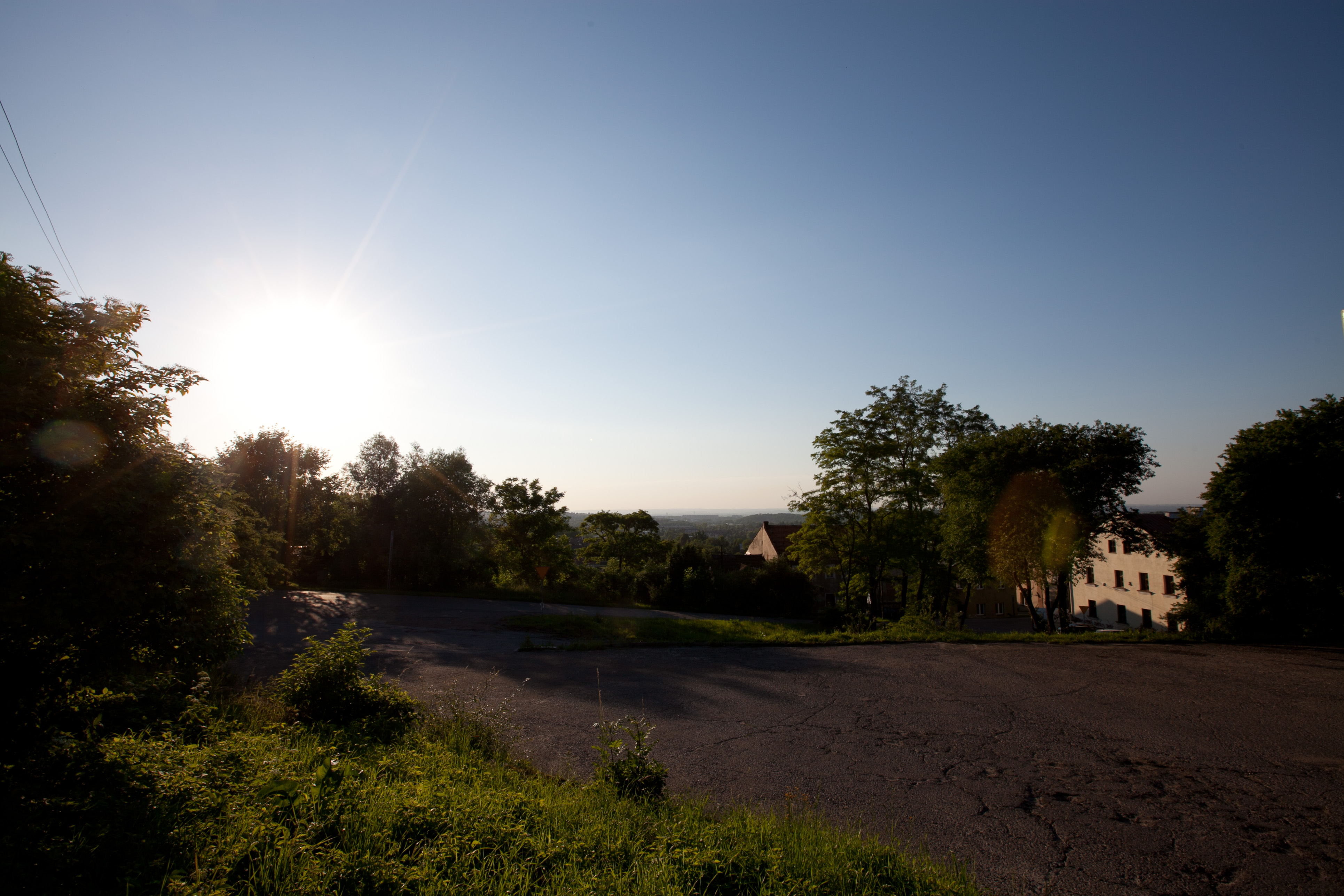 Wieliczka, Klasno, widok ogólny